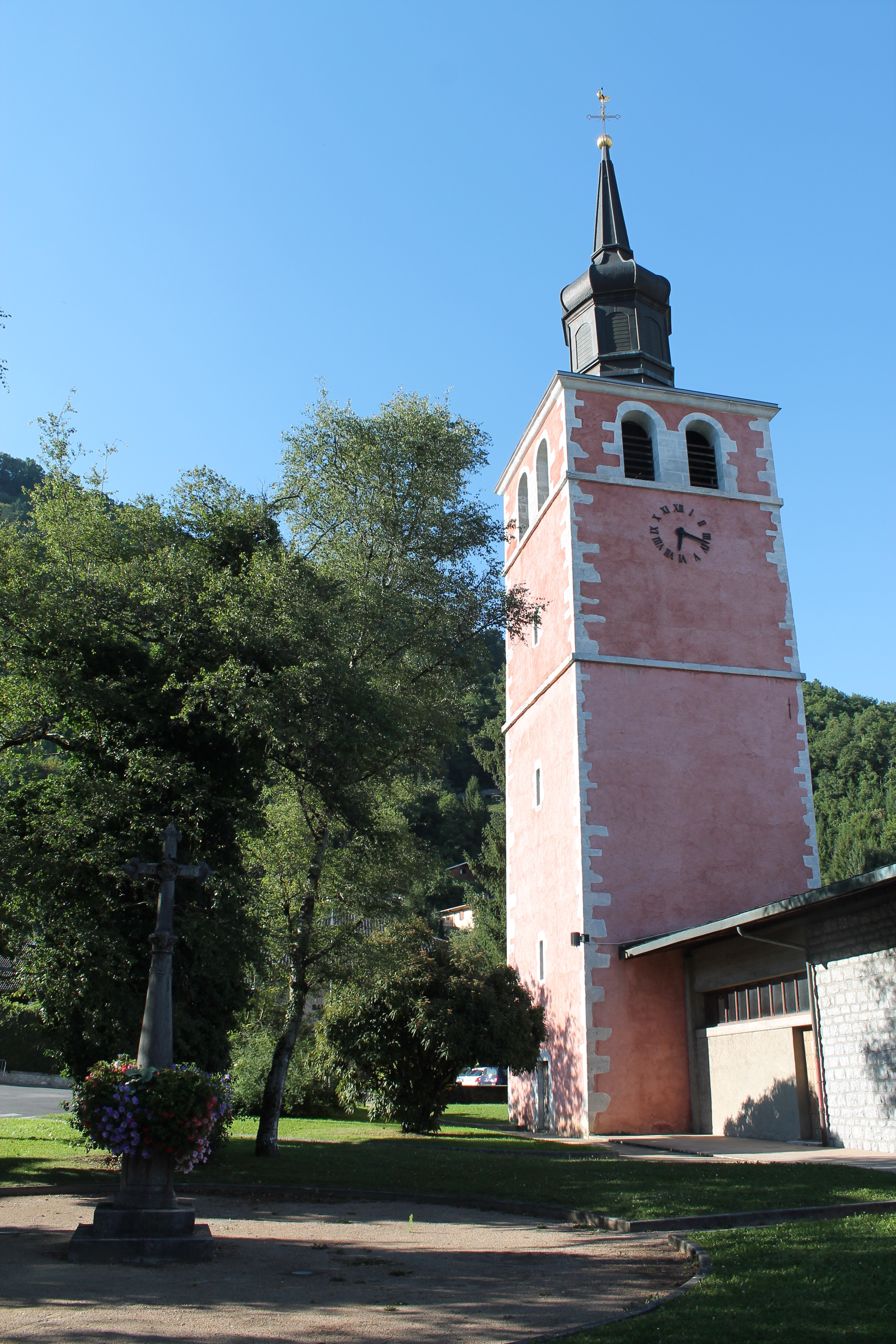 Clocher à bulbe de 1740 de l'église Saint-Maurice de Marignier